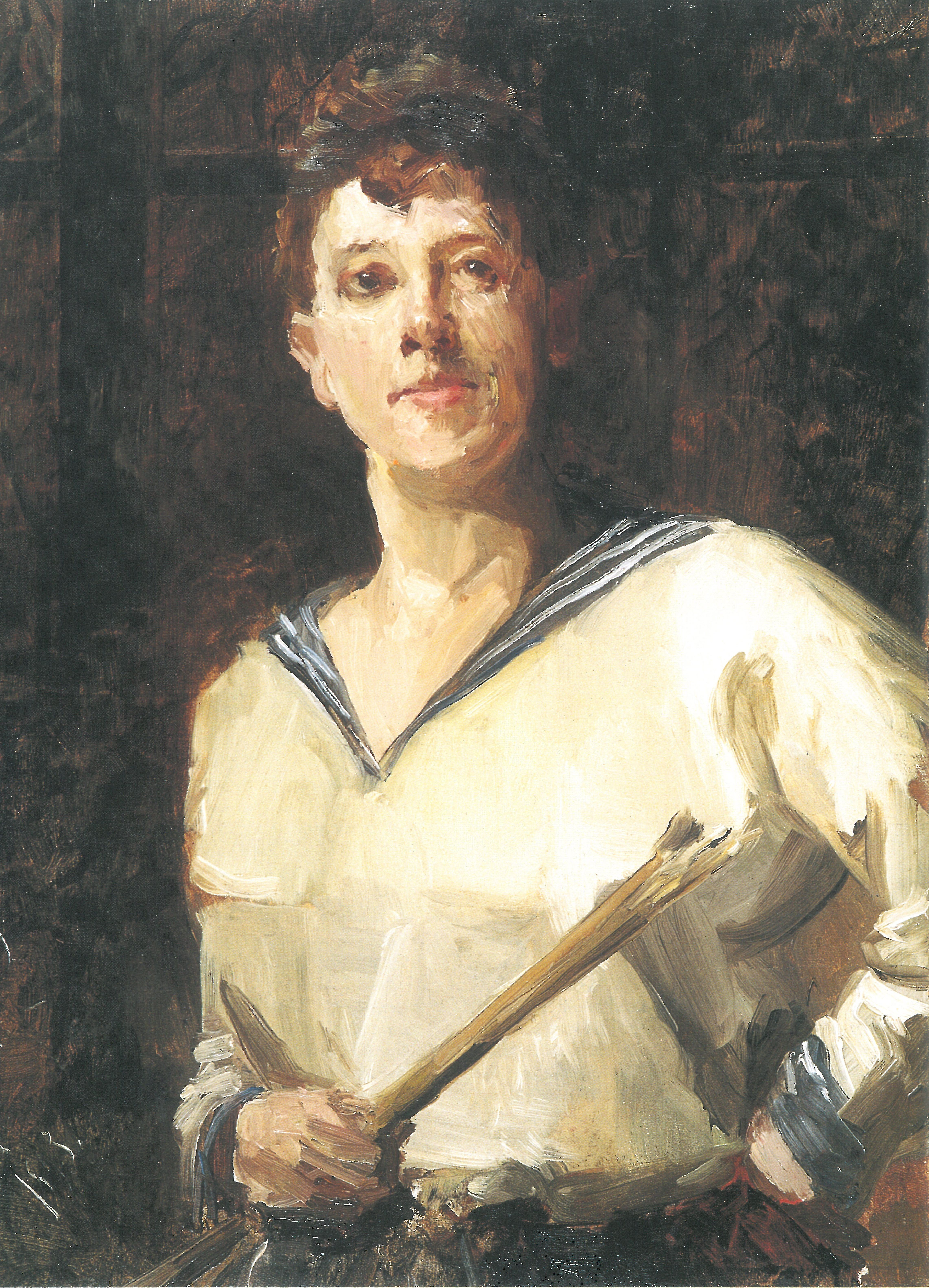 Marianne von Werefkin: Selbstbildnis in Matrosenbluse, 1893, 69 x 51 cm, Öl auf Leinwand, Fondazione Marianne Werefkin – Museo communale d'arte moderna, Ascona